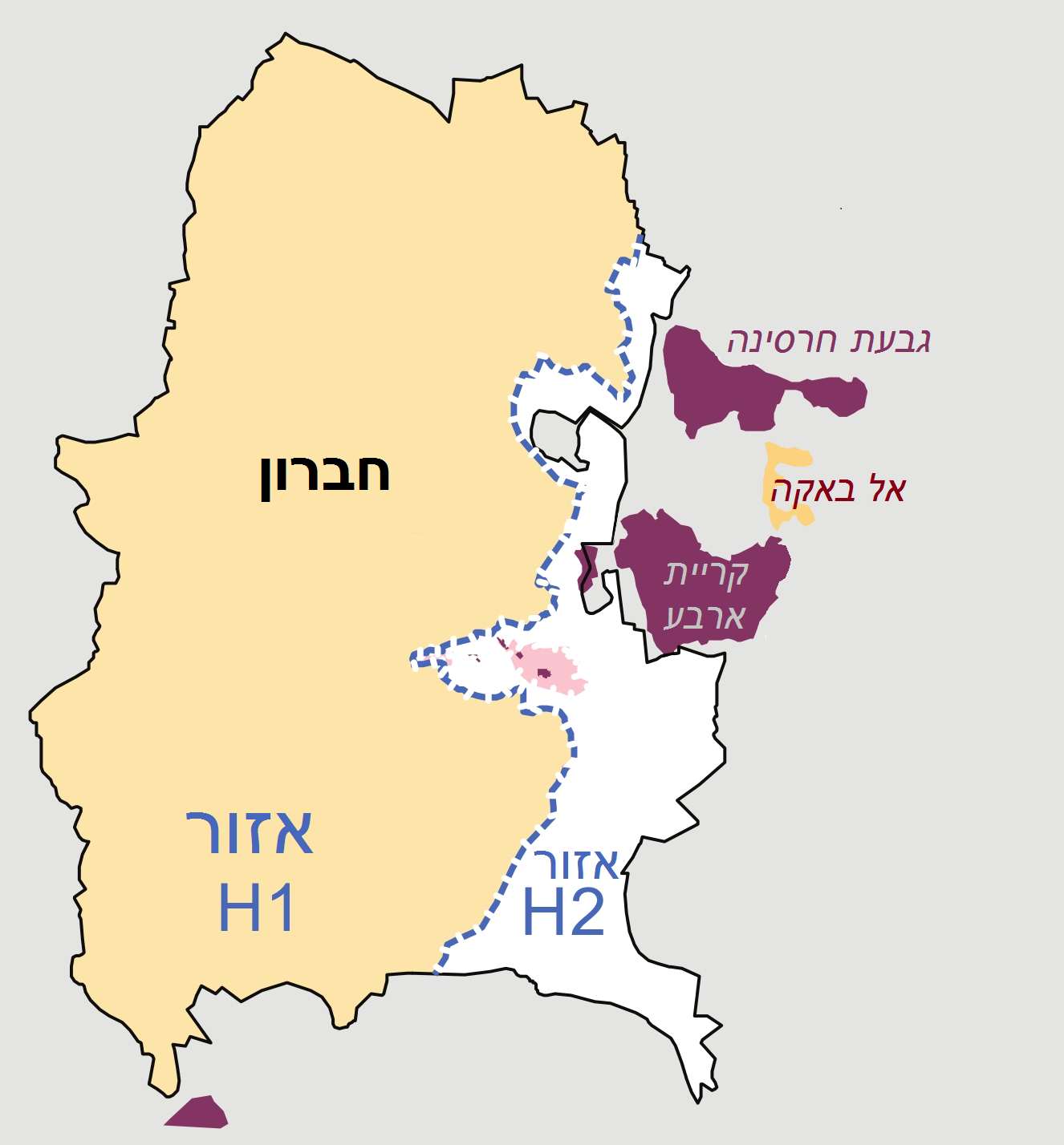 תיאור שטחי חברון וסביבתה, בהתאם להסכם חברון (1997). איור זה מבוסס על איור דומה באנגלית